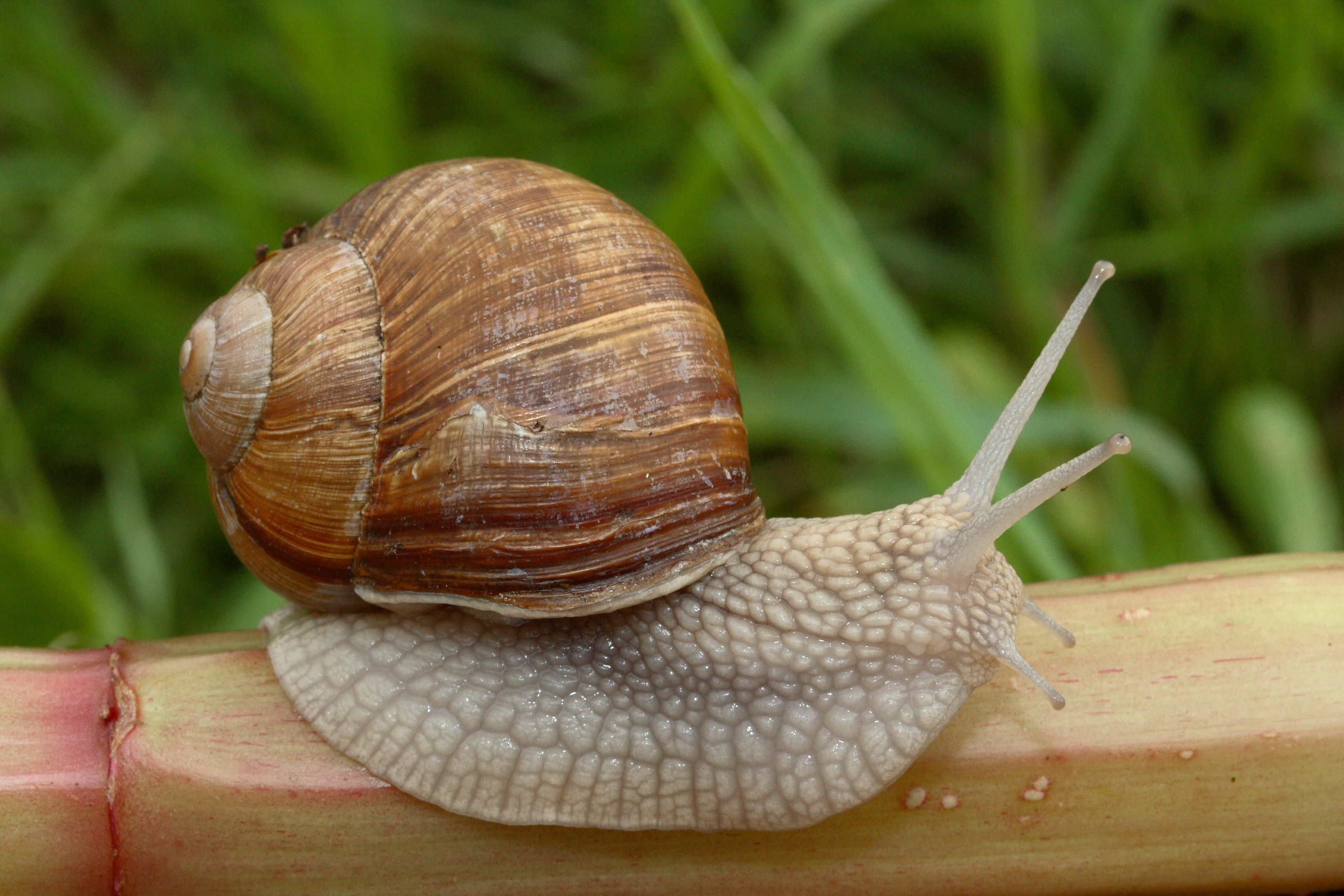 Weinbergschnecke, Helix pomatia